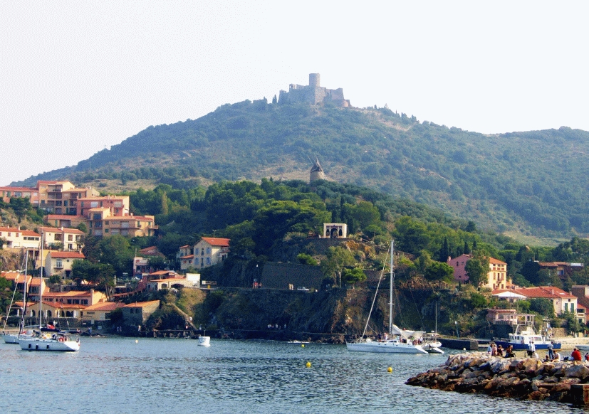 Castell de Cotlliure